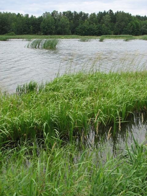 Staw Gichta w Parku Krajobrazowym Cysterskie Kompozycje Krajobrazowe